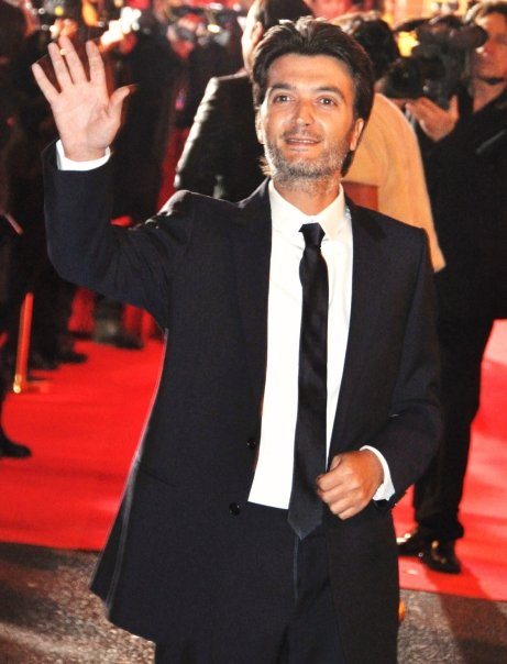 Thomas Langmann à la cérémonie des César